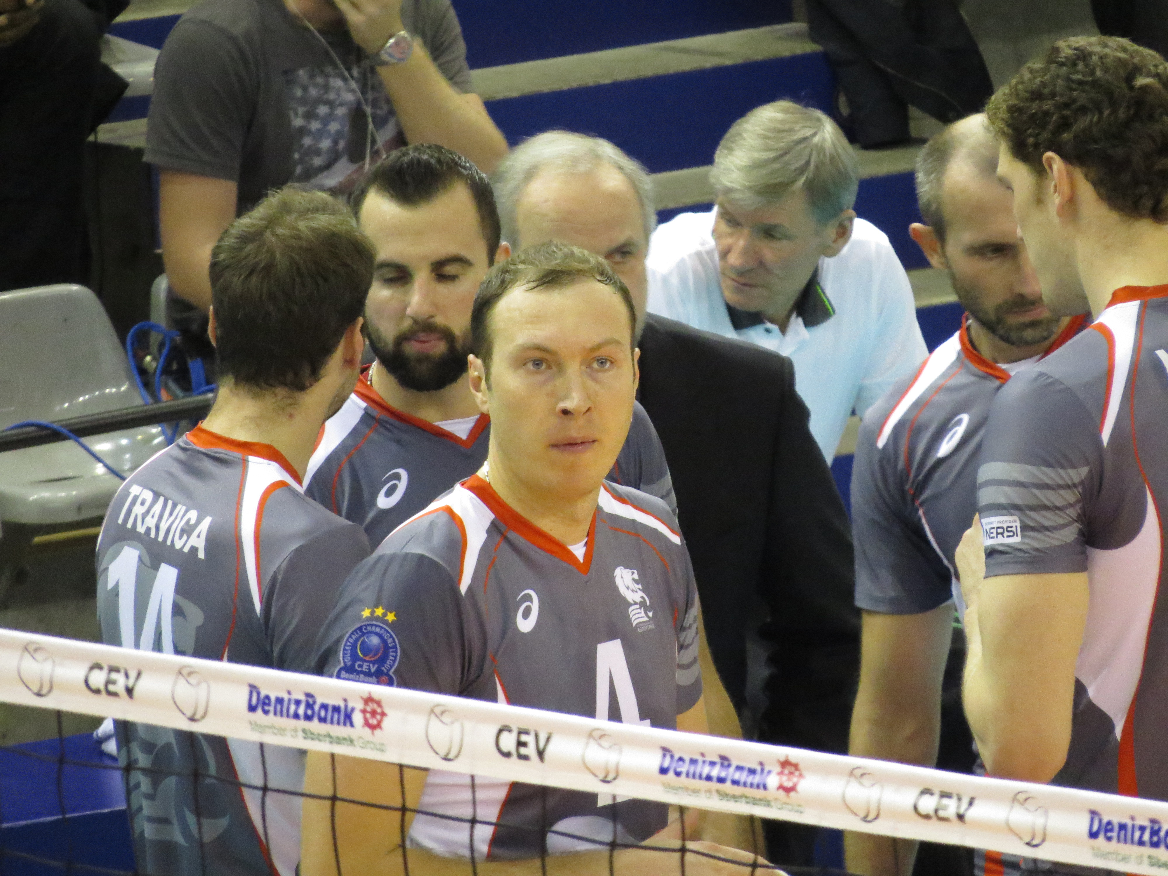 Photo réalisée lors du match de ligue des champions de volley entre le Paris Volley et le Lokomotiv Belgorod. Victoire de Belgorod 3-0 4 KHTEY Taras